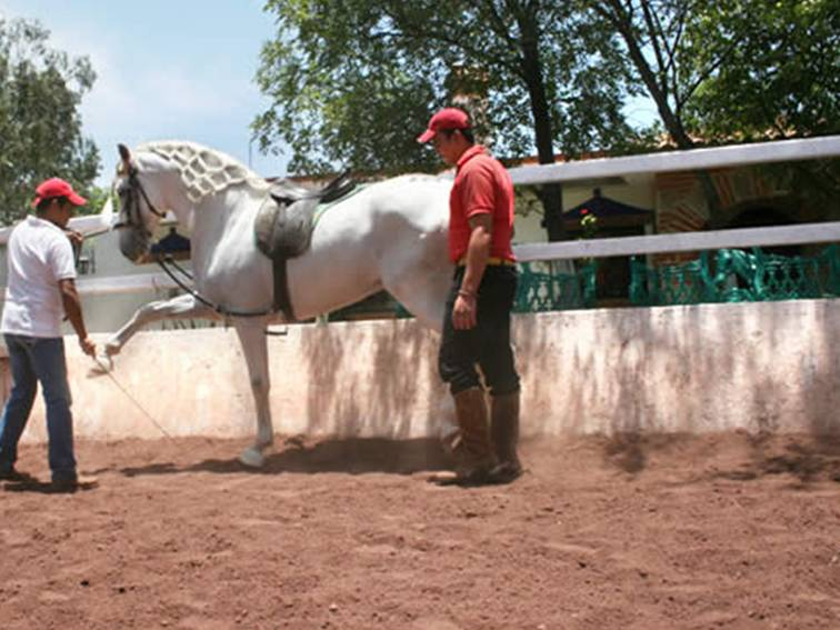 Iniciación de caballos en Alta Escuela